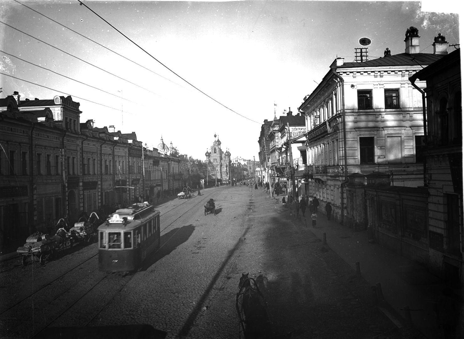 Улица Кооперативная